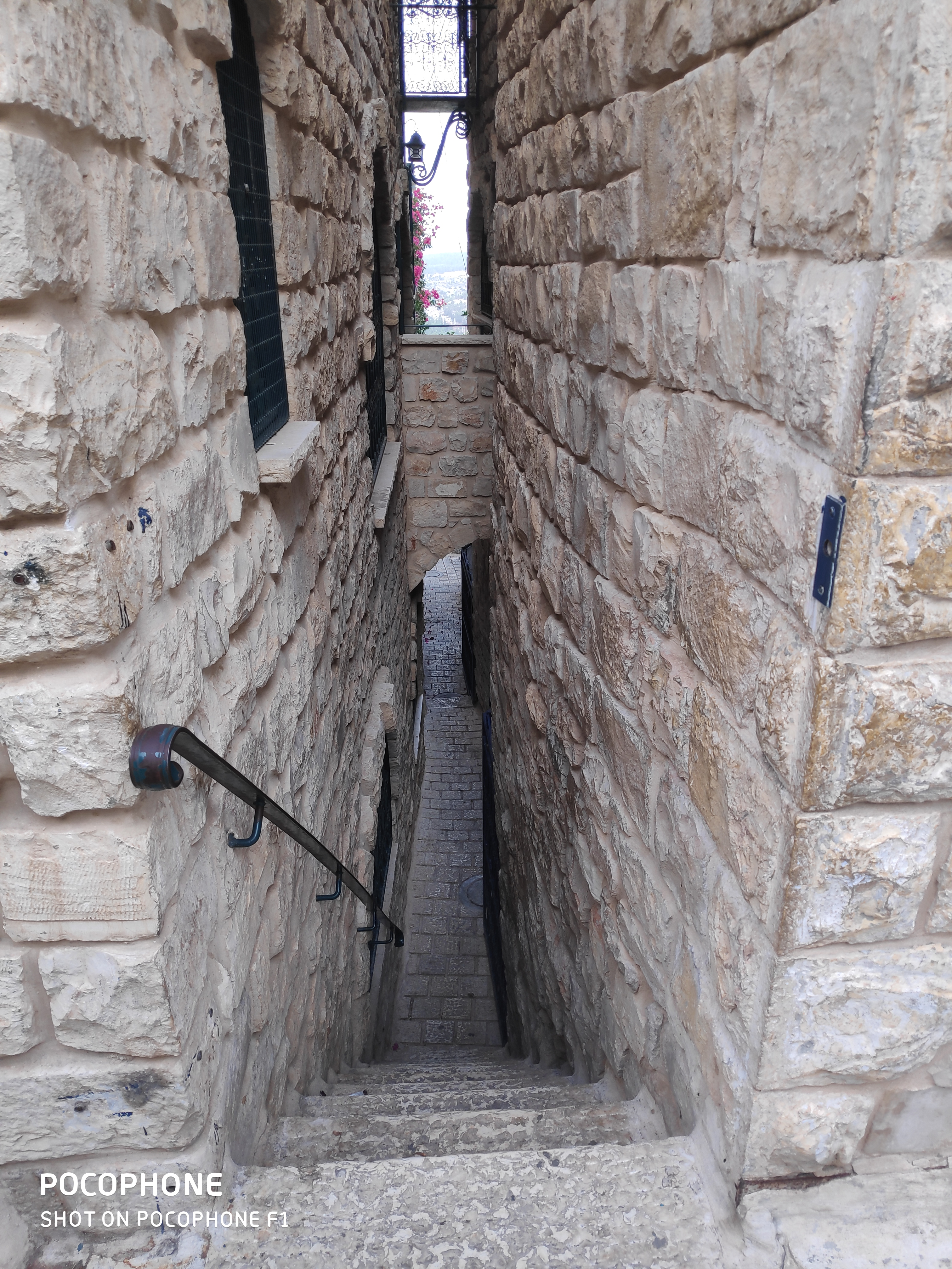 סמטת משיח, צפת